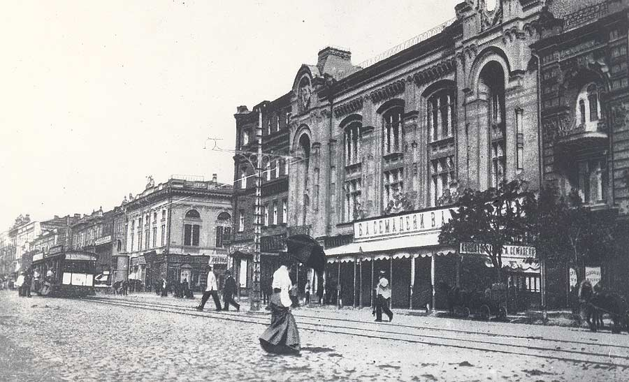 Киев, Крещатик, 15. Здесь находился Дворянский клуб, кафе-кондитерская Б. А. Семадени, Литературно-артистическое общество, Малый театр А. М. Крамского. Построено в 1877 г. по проекту В. И. Сычугова и А. Я Шиле, утрачено в 1941 году